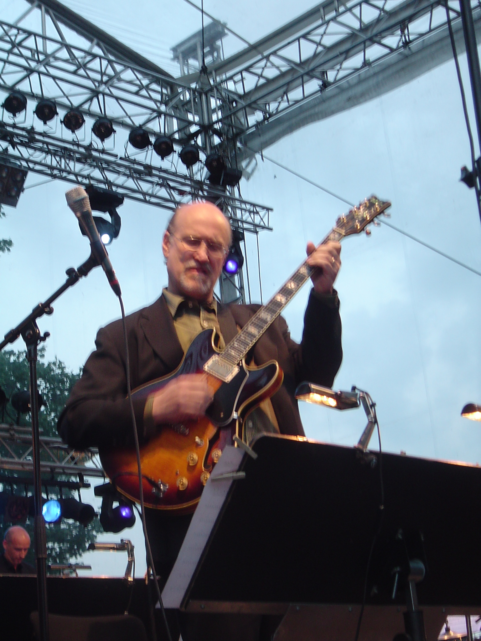 John Scofield tocando su guitarra Ibanez durante una actuación con la Metrople Orchestra.